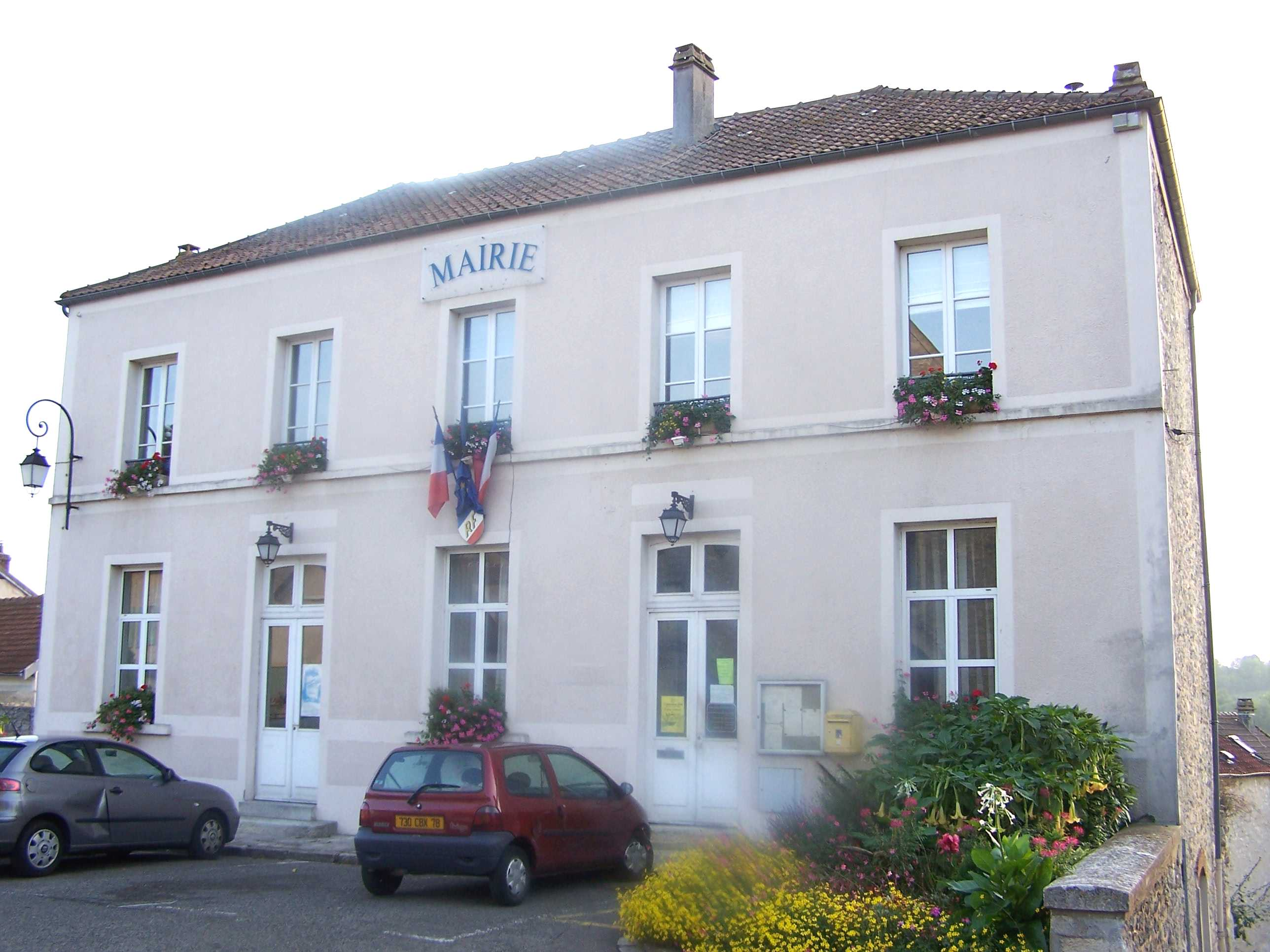 Mairie de Chavenay (Yvelines, France)